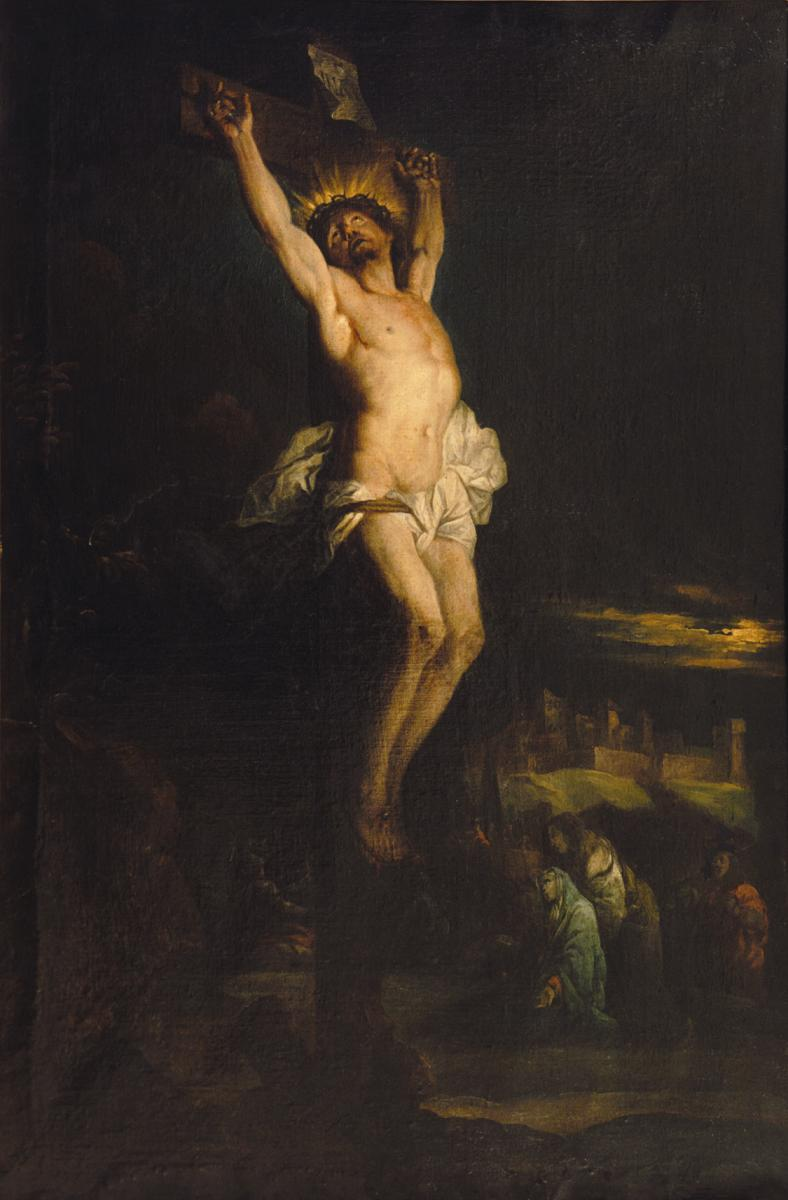 Christe expiant sur la croix